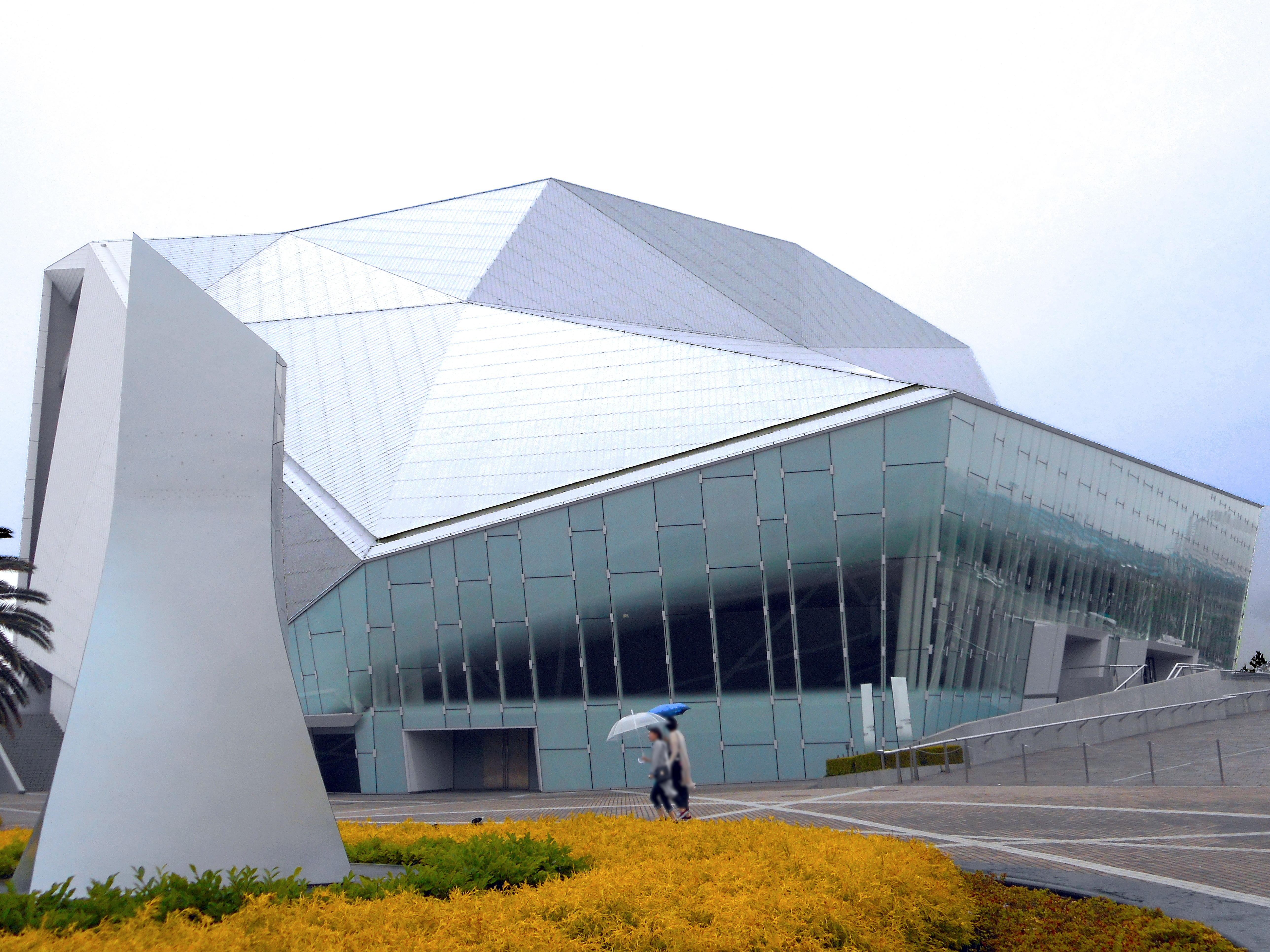 舞浜アンフィシアター（2016年5月30日に撮影）